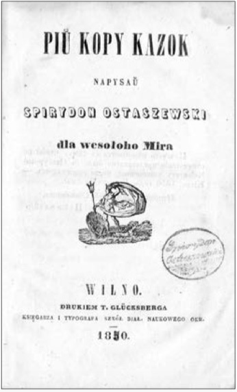 OSTASZEWSKI Spirydon – Piu kopy kazok. Napisau ... dla wesołoho Mira. Wilno 1850. Drukiem N. Glüksberga. 16d, s. 200, [2].